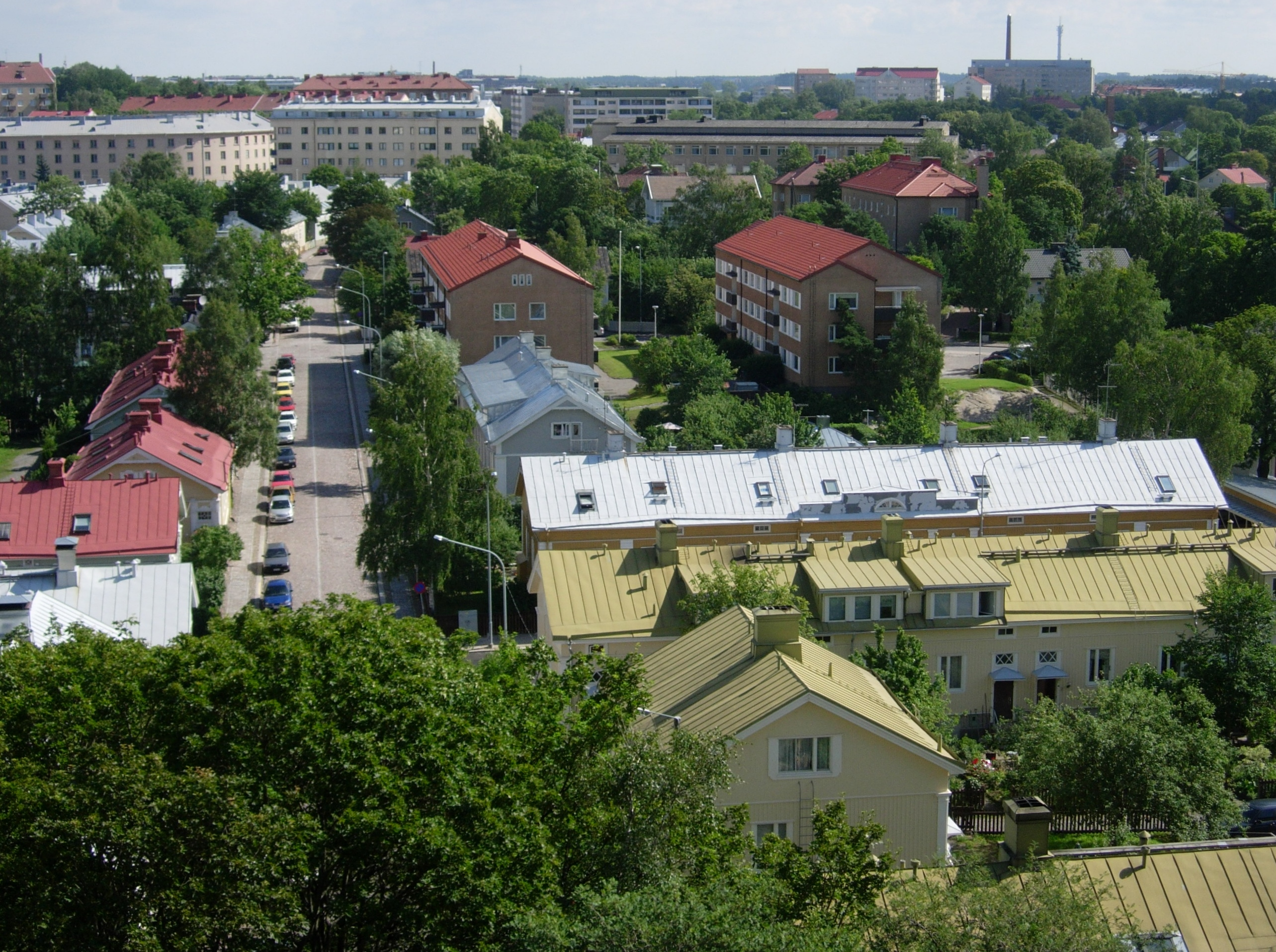 Vasemmalla Mestarinkatu, Martin kaupunginosassa